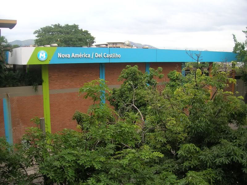 Foto externa da estação Nova América/Del Castilho do Metrô Rio.